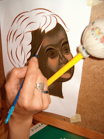 Srpskohrvatski / српскохрватски: Učenica vežba na papiru